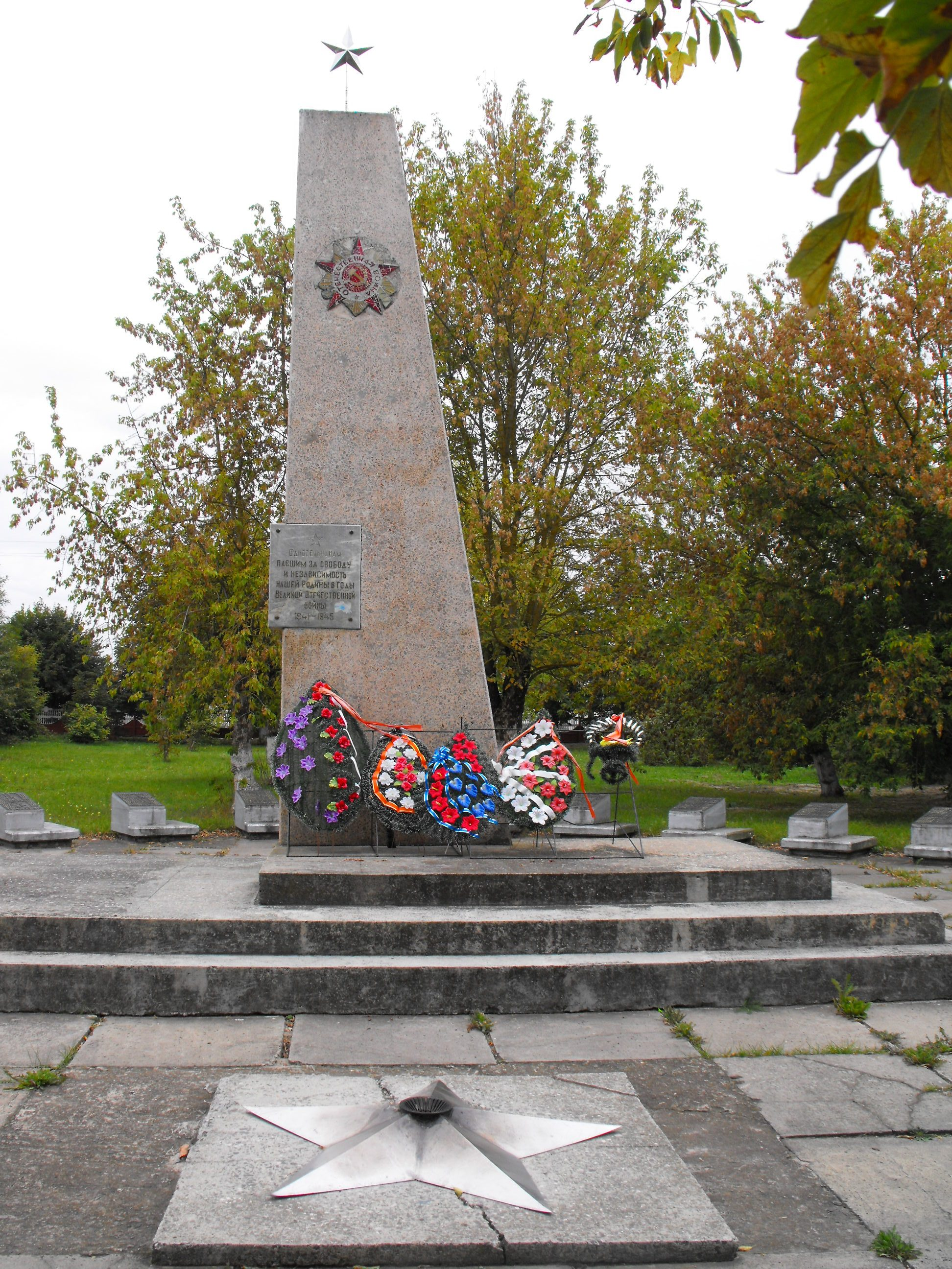 Памятник жителям деревни Малеч (Малец) Березовского района Брестской области (в том числе и евреям), убитым нацистами во время оккупации в 1941-1943 годах.